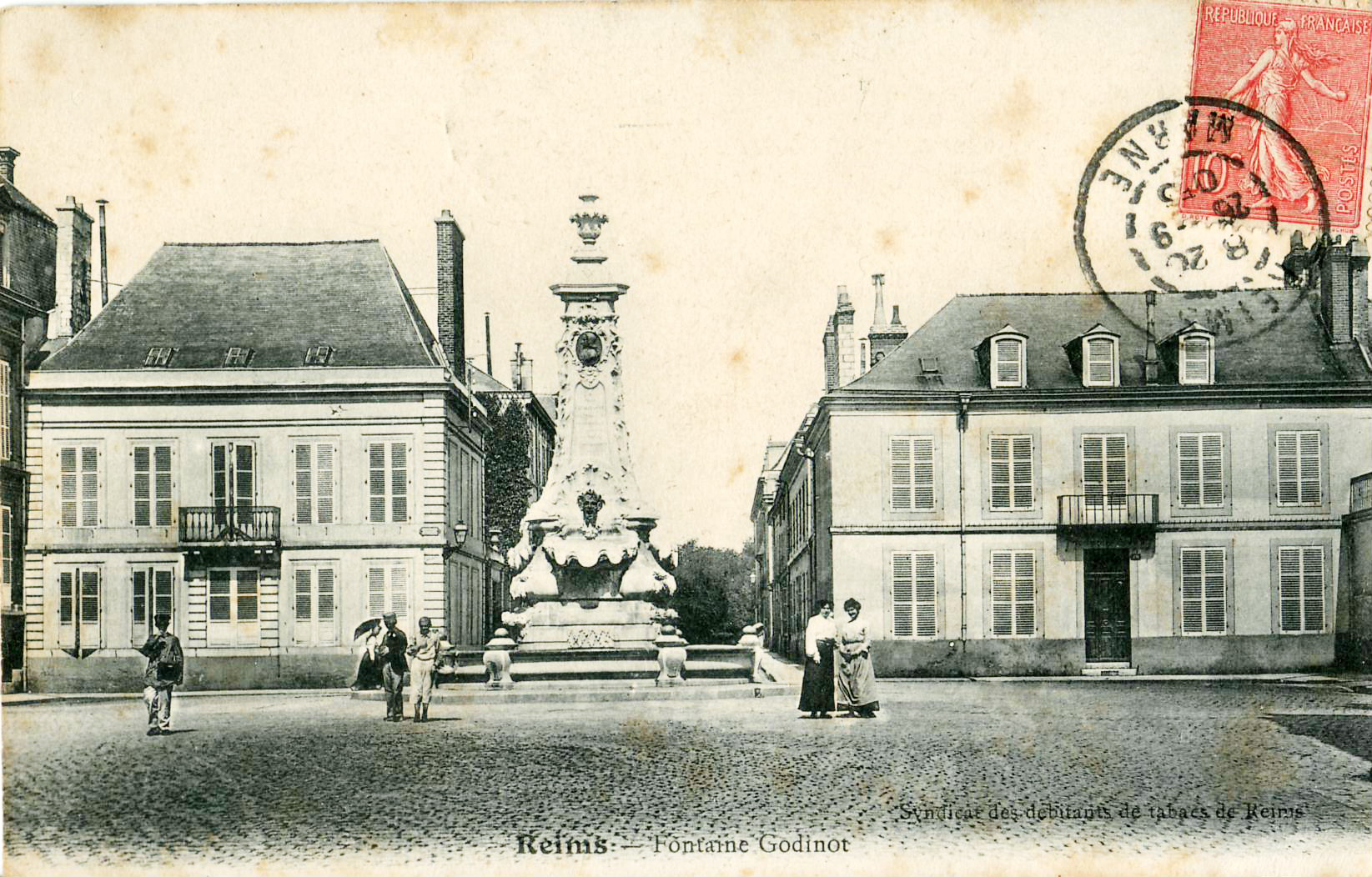 Carte postale ancienne éditée par le Syndicat des débitants de tabacs de Reims :REIMS - Fontaine Godinot